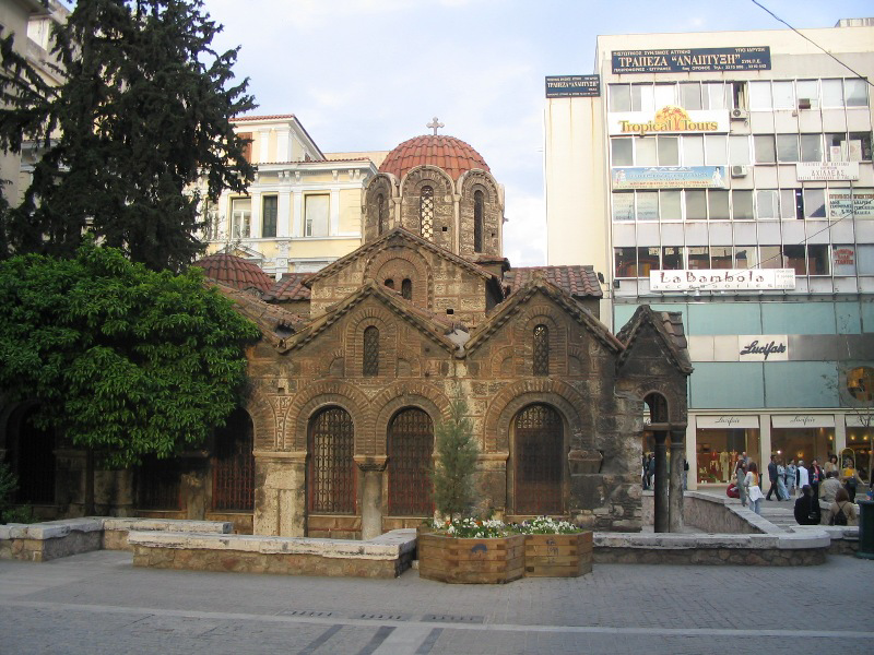 Die Kapnikarea-Kirche in Athen (11. Jahrhundert), eine byzantinische Kreuzkuppelkirche